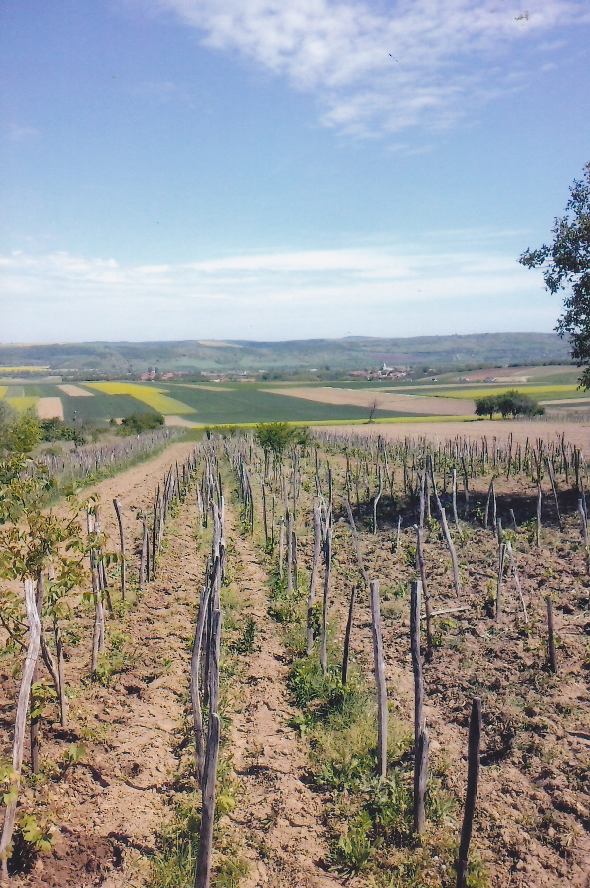 Imaginea satului Margine dinspre dealul de miazazi (Hiji) spre dealul de miazanoapte (Homnaj)